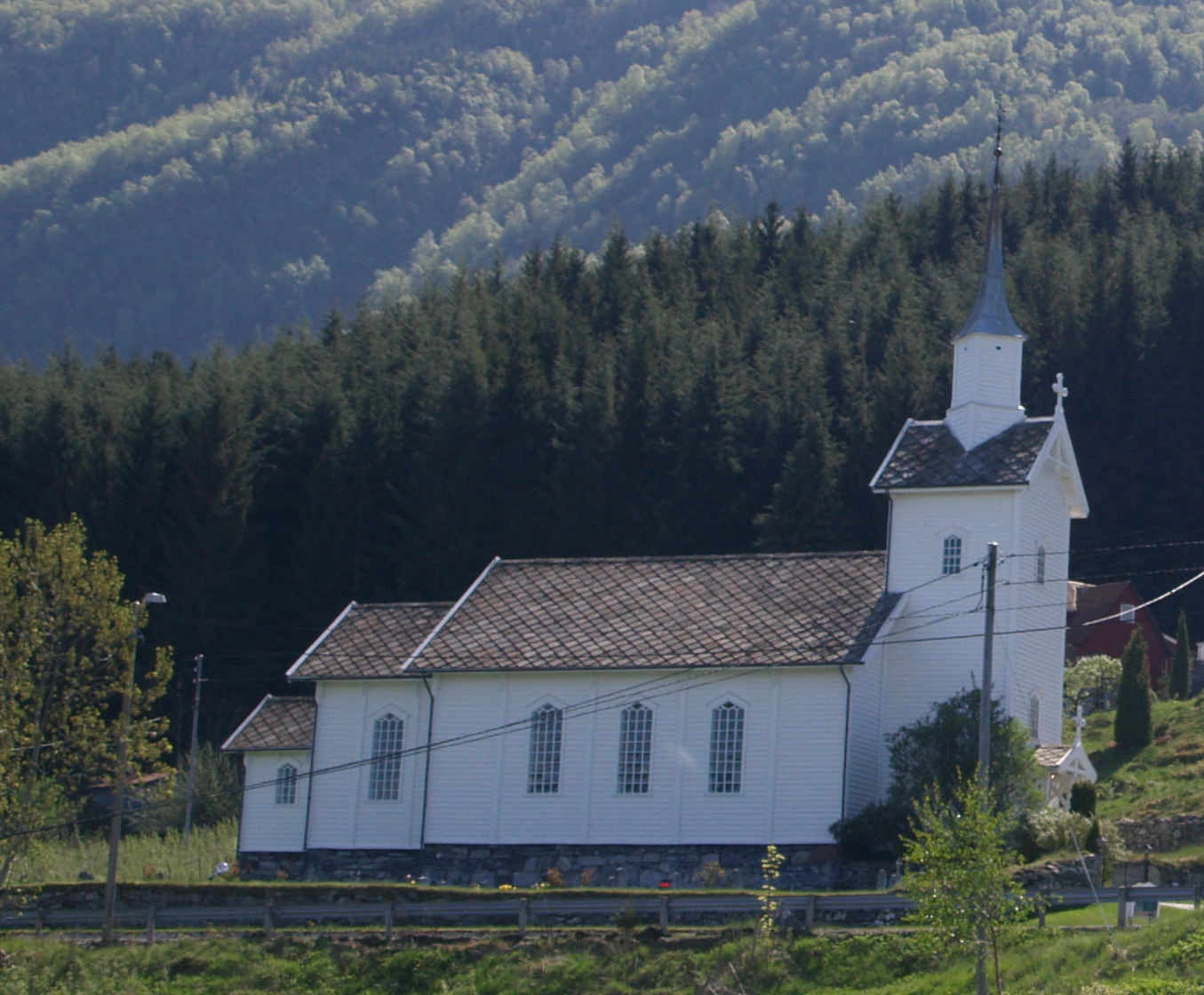 Feios kyrkje sett fra Rindesneset